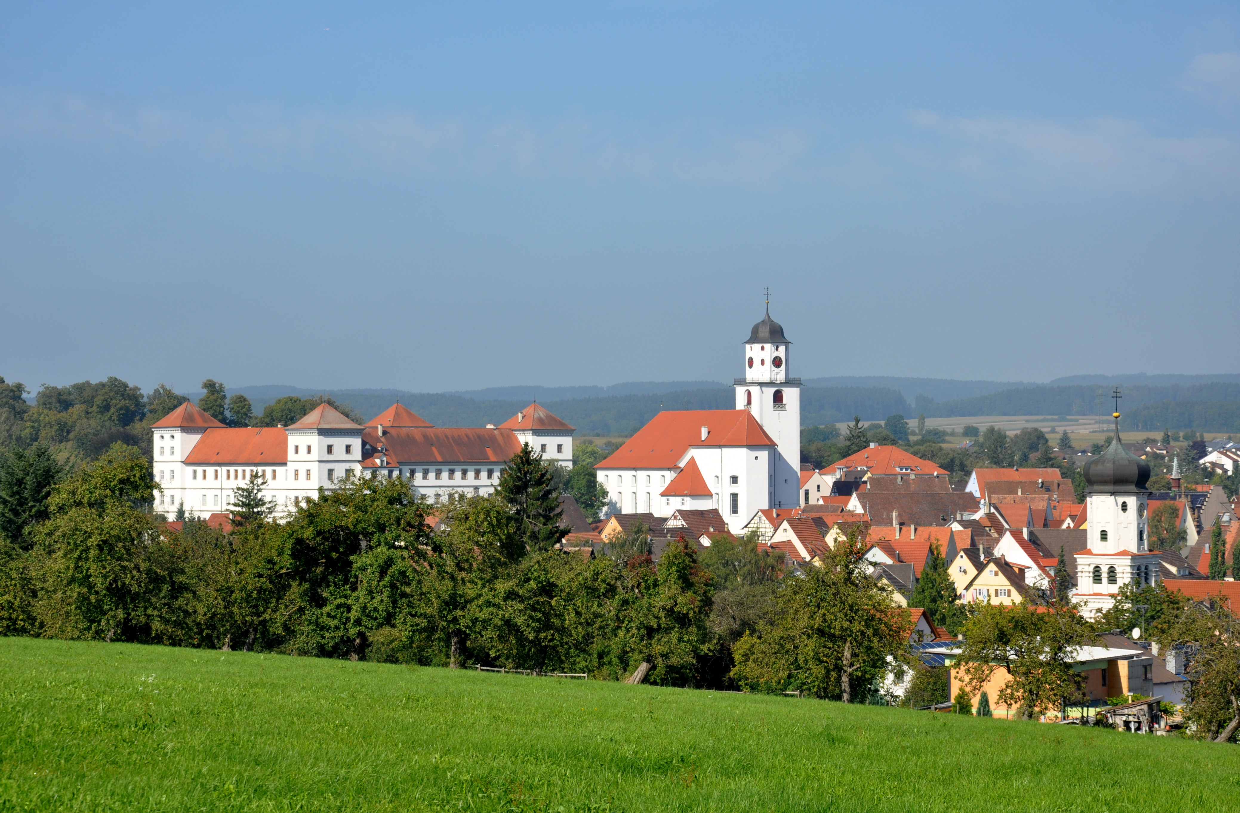 Meßkirch, Blick auf Schloss und Pfarrkirche, rechts vorne der Turm der Liebfrauenkirche